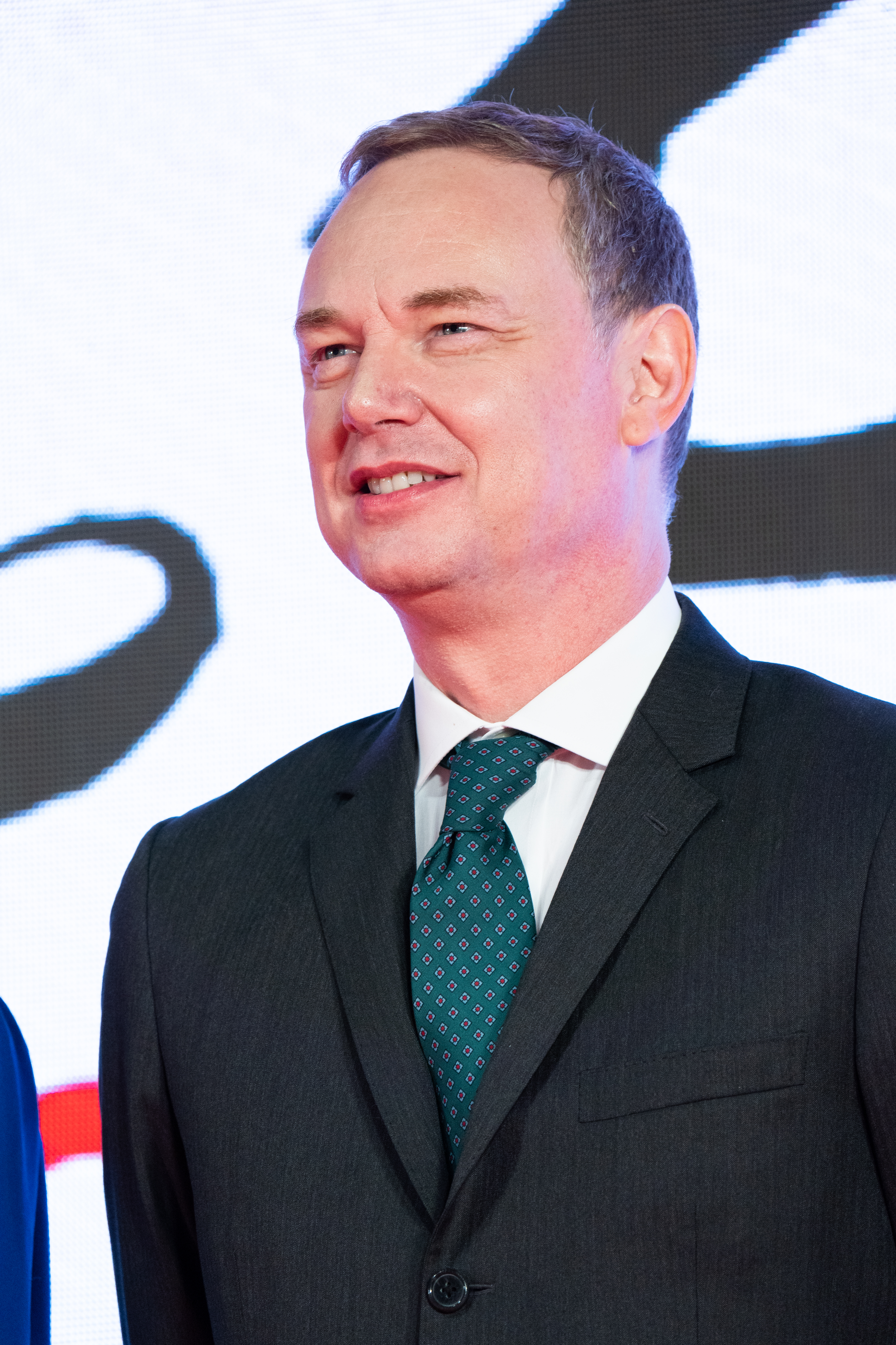 第32回 東京国際映画祭 オープニングセレモニー ウォッシュ・ウェストモアランド (アースクエイクバード)